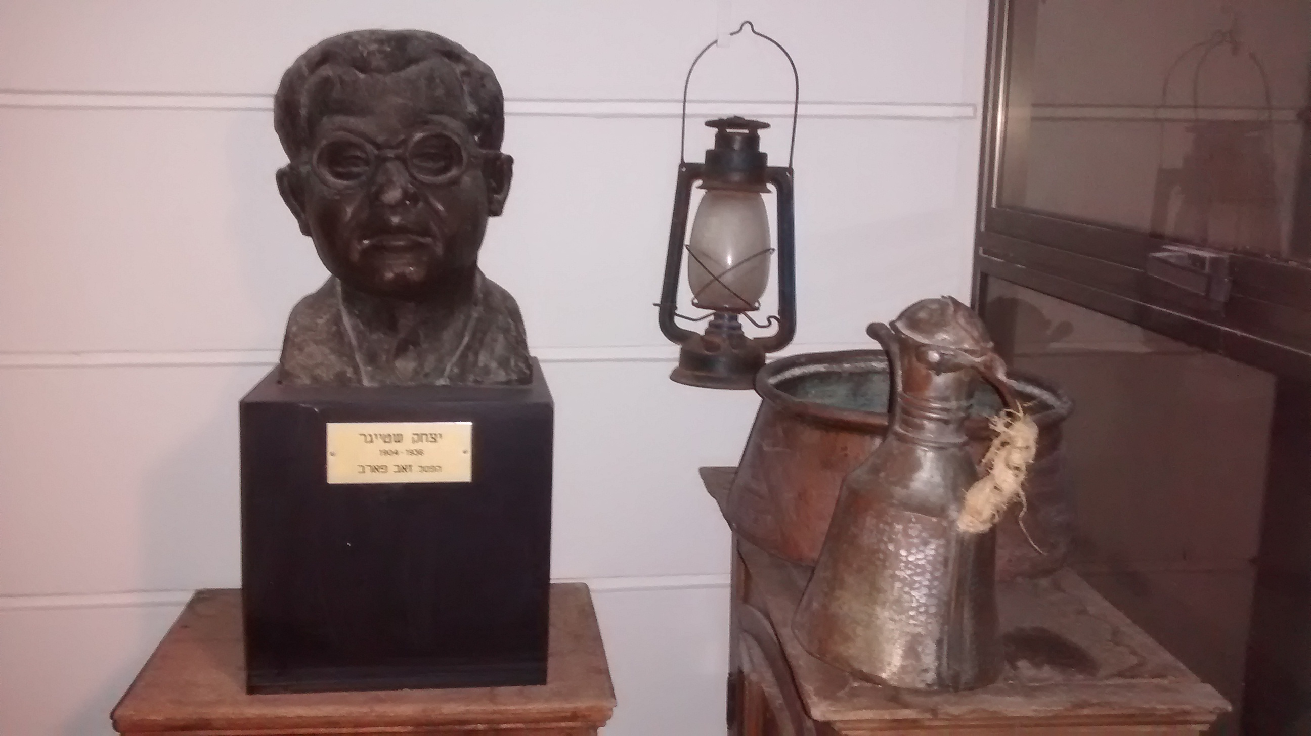 פסל יצחק שטייגר מאת הפסל זאב פארב מוצג בפינה לזכרו בבית גדי בתל יצחק פברואר 2017